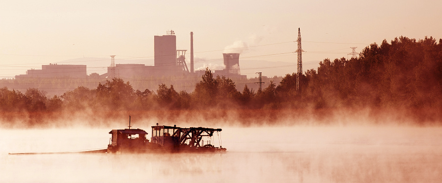 Solca Karviná